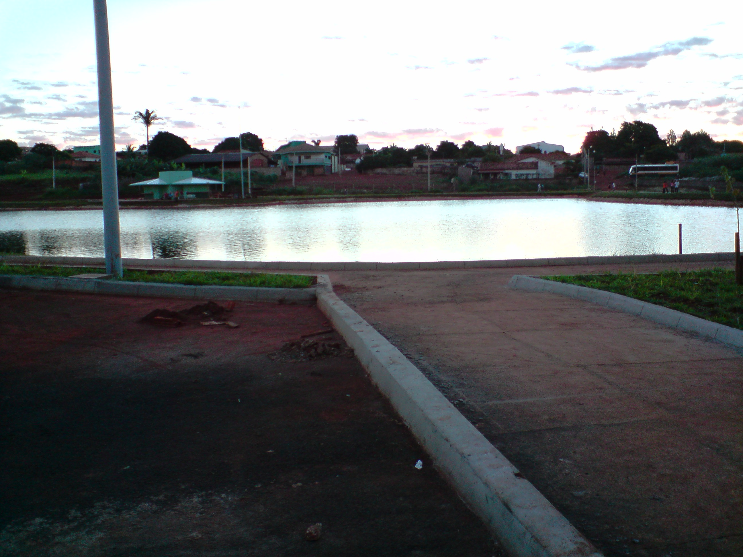 Lago do parte ecológico na cidade de Montividiu